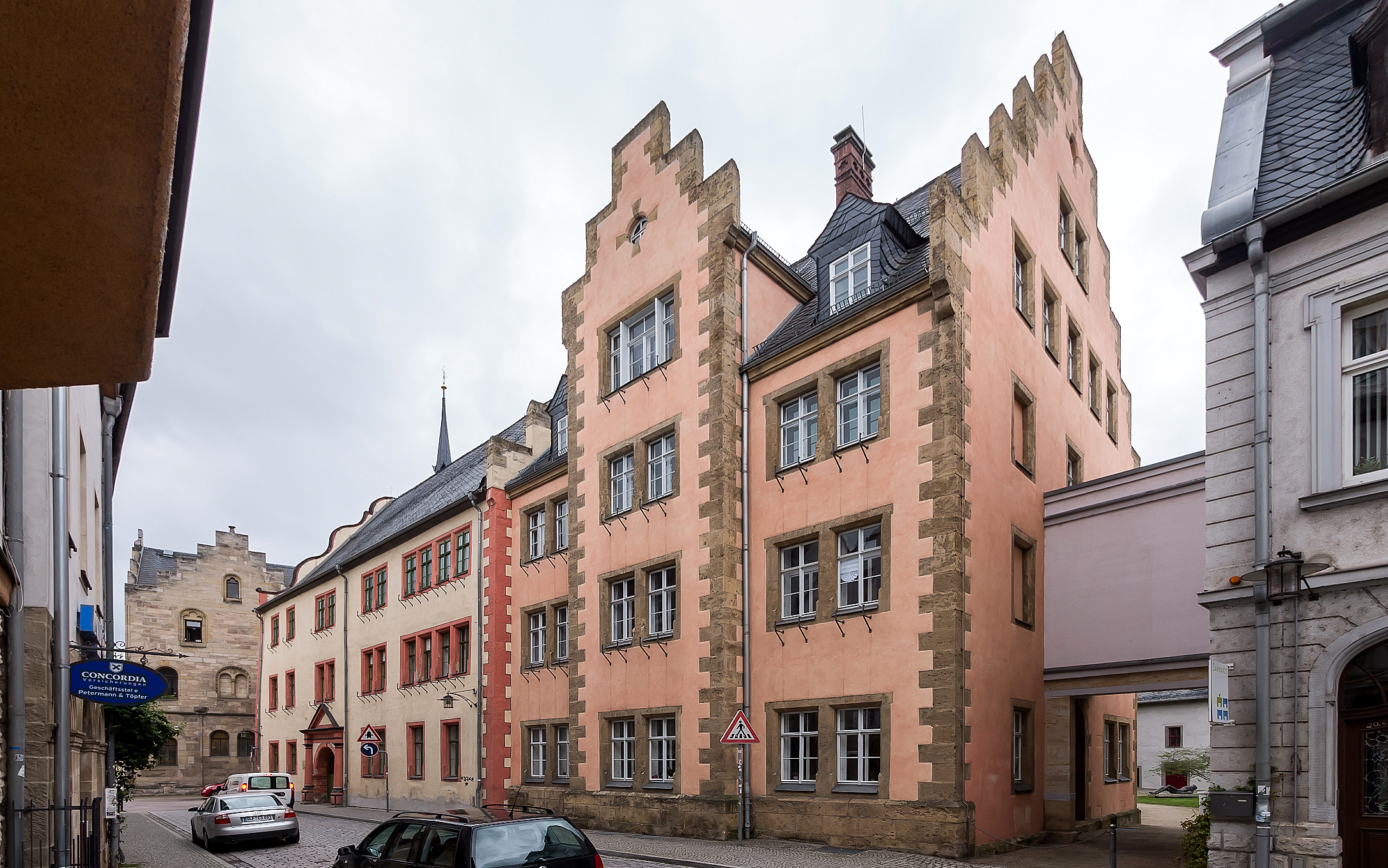 Saalfeld Darrtorstraße 1 "Alte Münze" IV